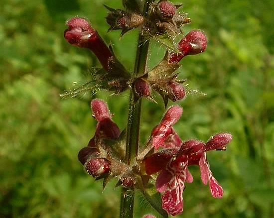 Épiaire des bois, Bucey_lès-Gy, juin 2004